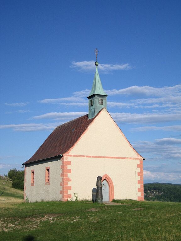 Walberla, Walpurgis-Kapelle